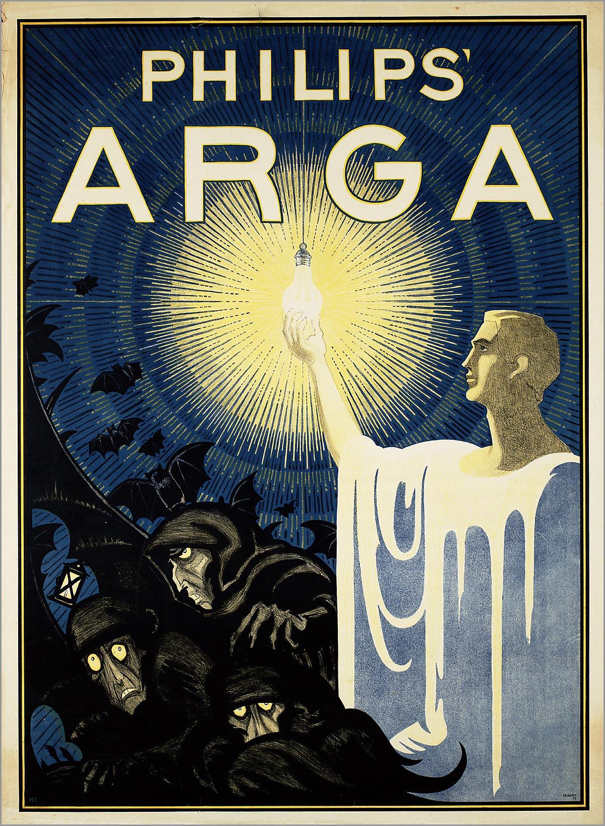 Affiche:Philips Arga Lampen.